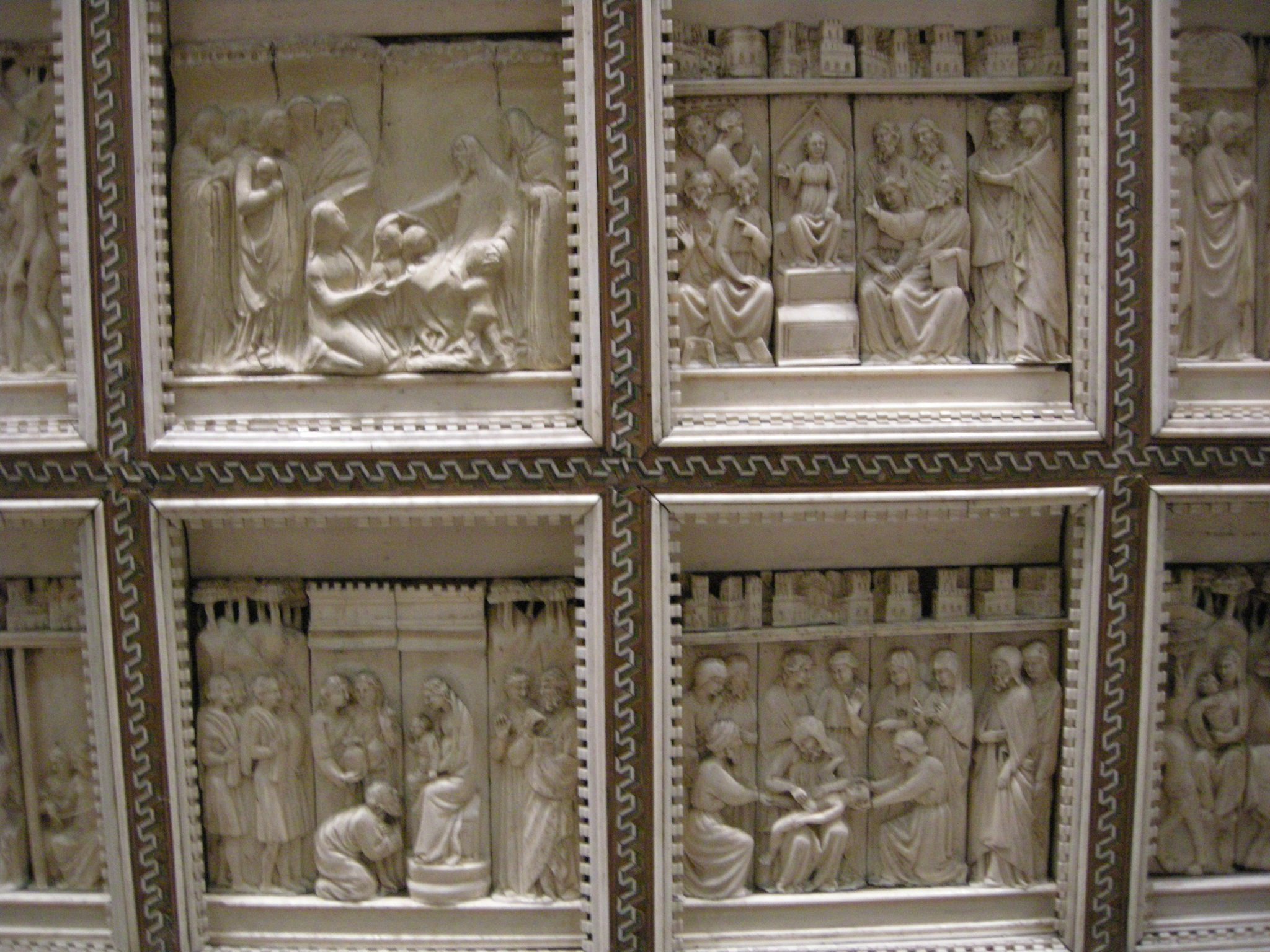 Retablo della bottega degli embriachi 02.JPG